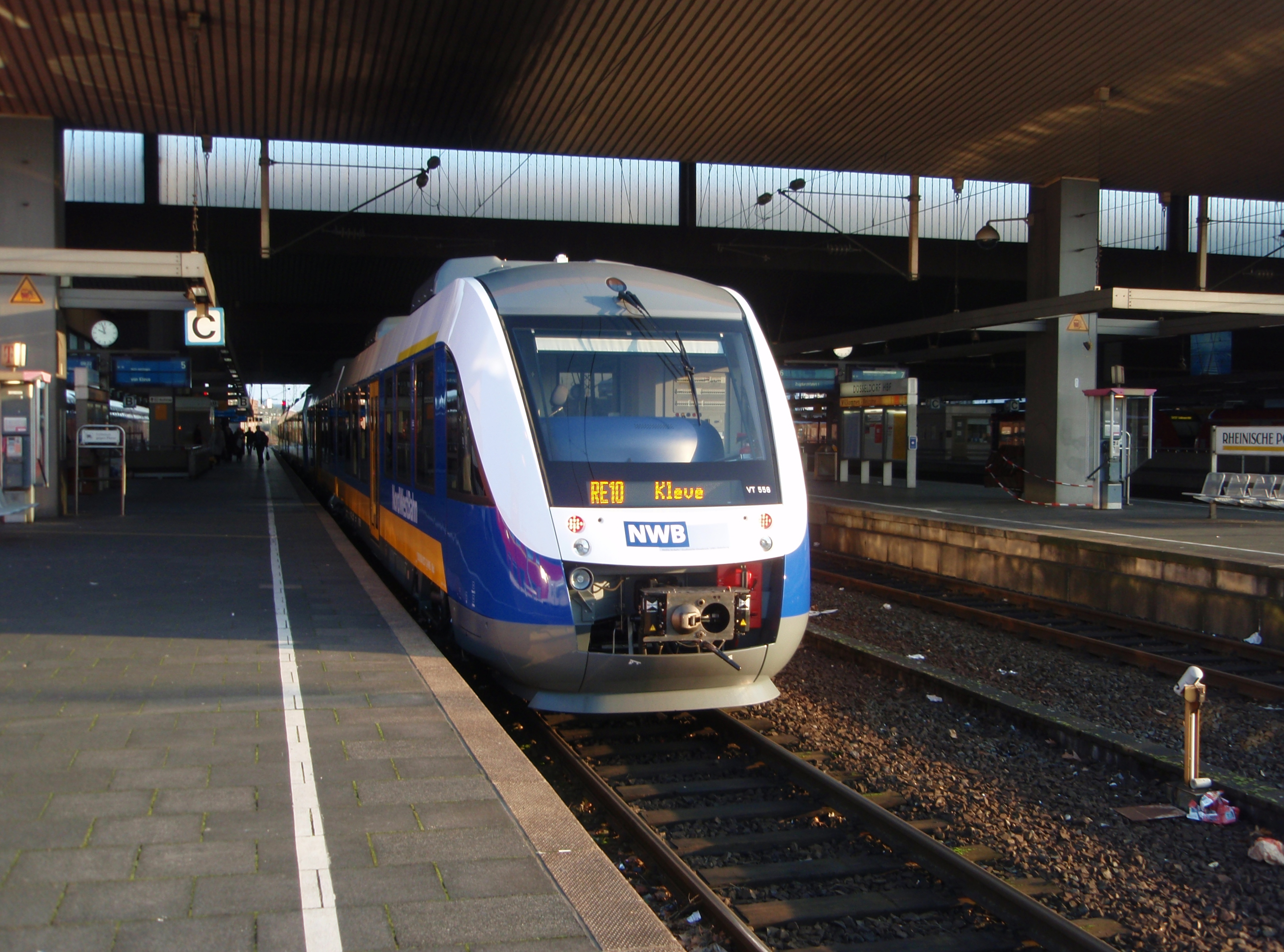 VT 558 der NordWestBahn als RE 10 nach Kleve in Düsseldorf Hbf